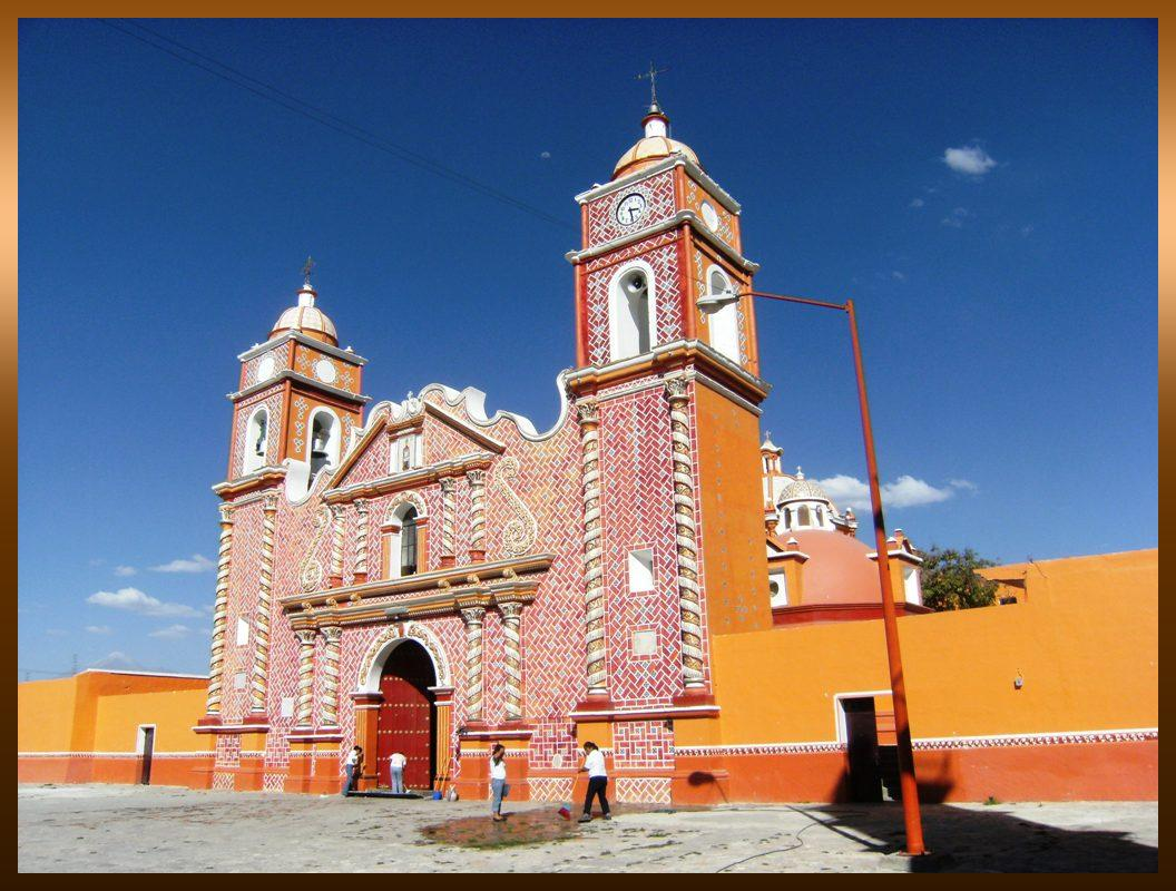 Parroquia de San Agustin Obispo, Palmar de Bravo, Puebla, México.